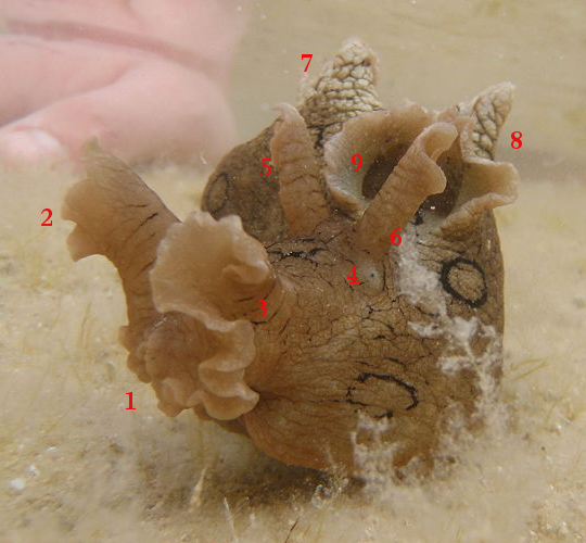 Aplysia dactylomela (Seehase) Wichtige anatomische Teile nummeriert 1. Vorderseite mit Schlund 2.rechter oraler Tentakel 3. linker oraler Tentakel 4. linkes Auge (schwarzer Punkt auf hellemUntergrund) 5. rechte Rhinophore 6. linke Rhinophore 7. rechter Parapodiallappen 8. linker Parapodiallappen 9. Parapodialhöhle, gebildet durch beide Parapodiallappen, darin mantelumhüllte innere Schale mit unterliegender Mantelhöhle